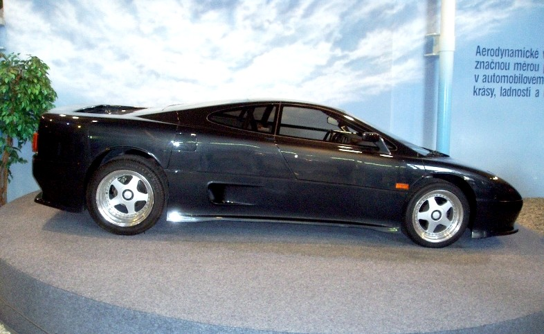 MTX Tatra V8, Photo: Ondrej Ertl (2006), Kopřivnice